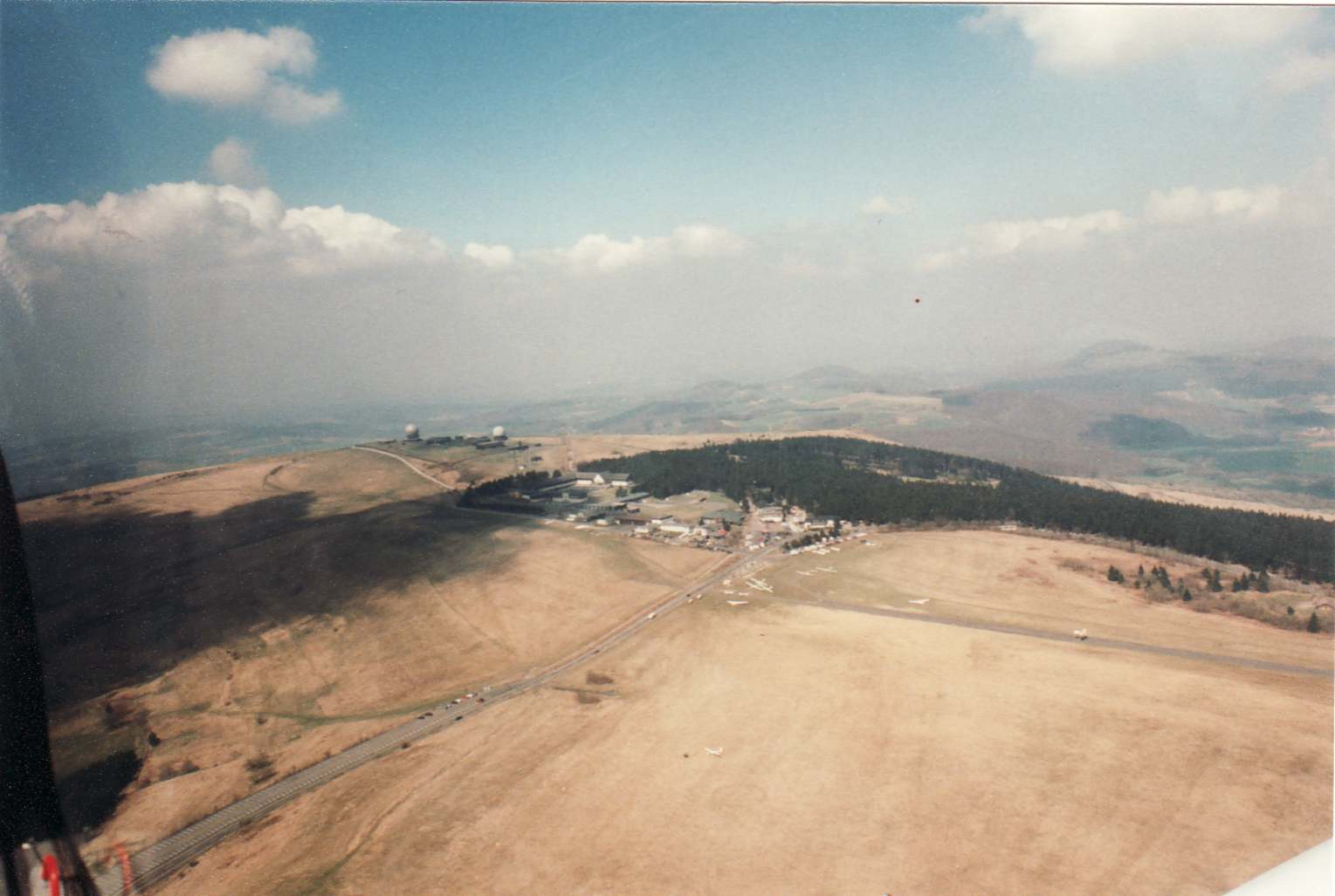 Wasserkuppe (Rhön, Deutschland) Südostansicht 1996